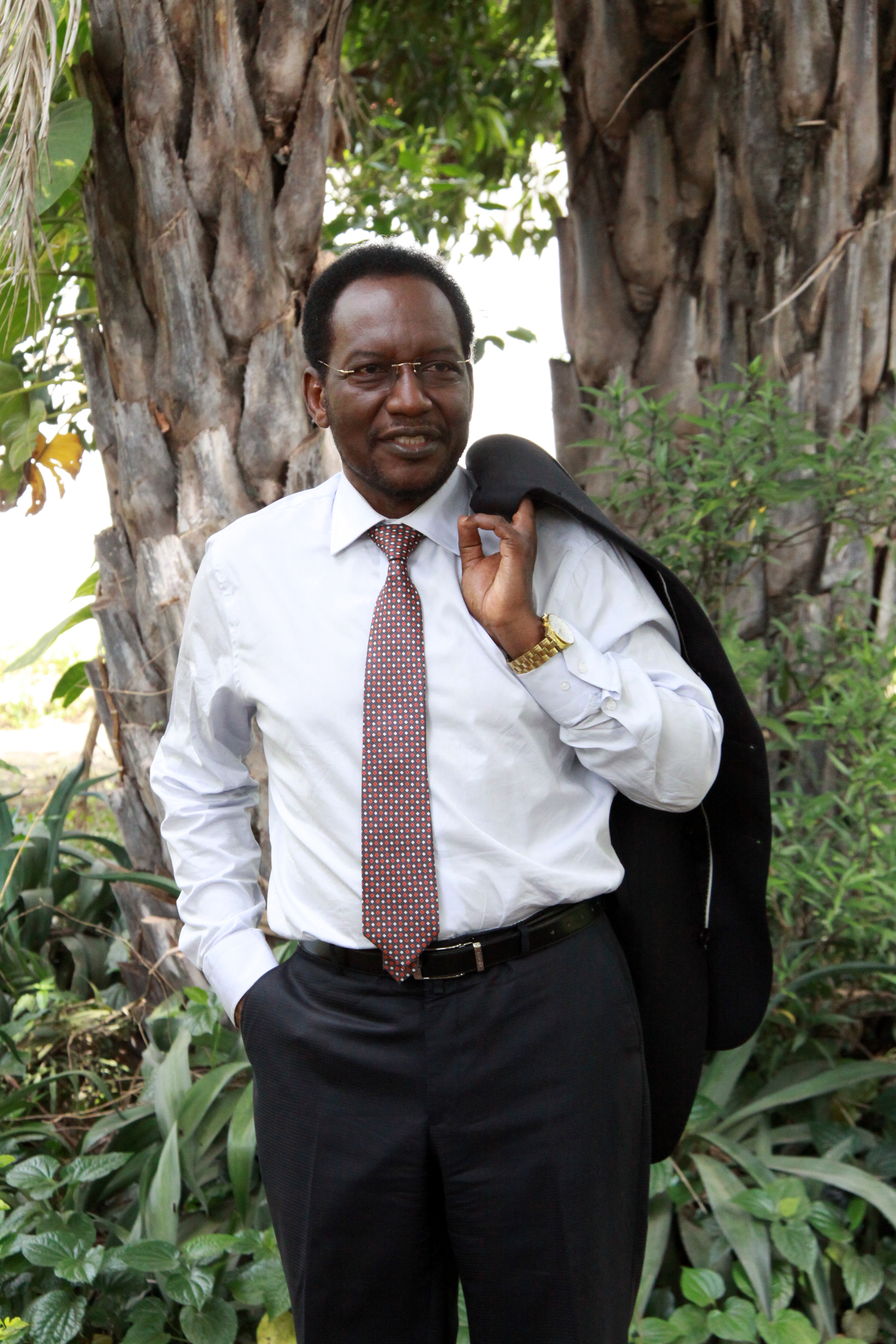 Dioncounda Traore candidat à l'élection présidentielle en 2012 au Mali